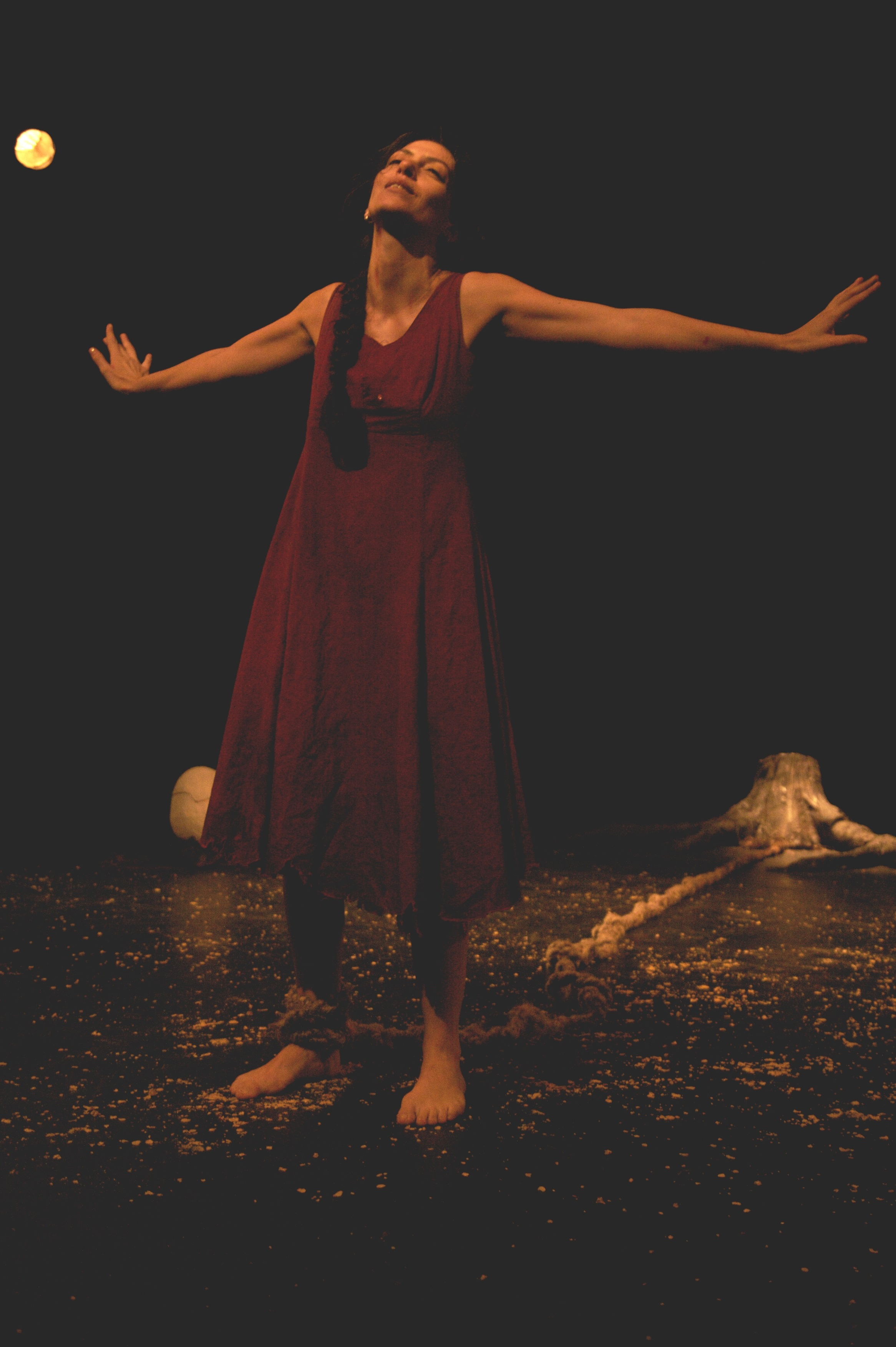 קשורה